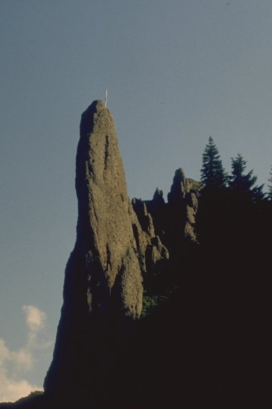 Siplingernadel